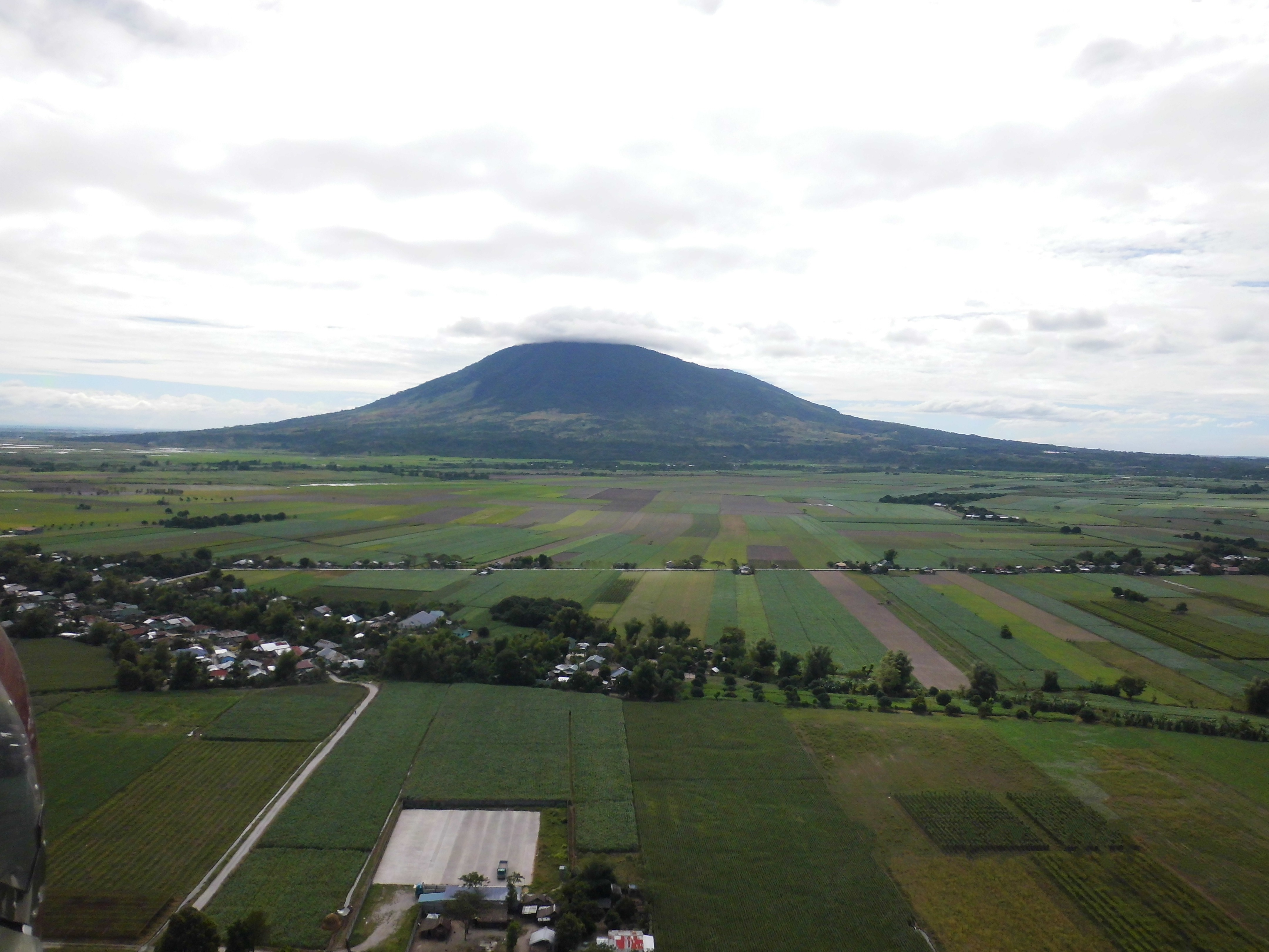 Sicht auf den Mt. Arayat von Norden aus; Entfernung ca. 8km, Flughöhe über Grund ca. 120m